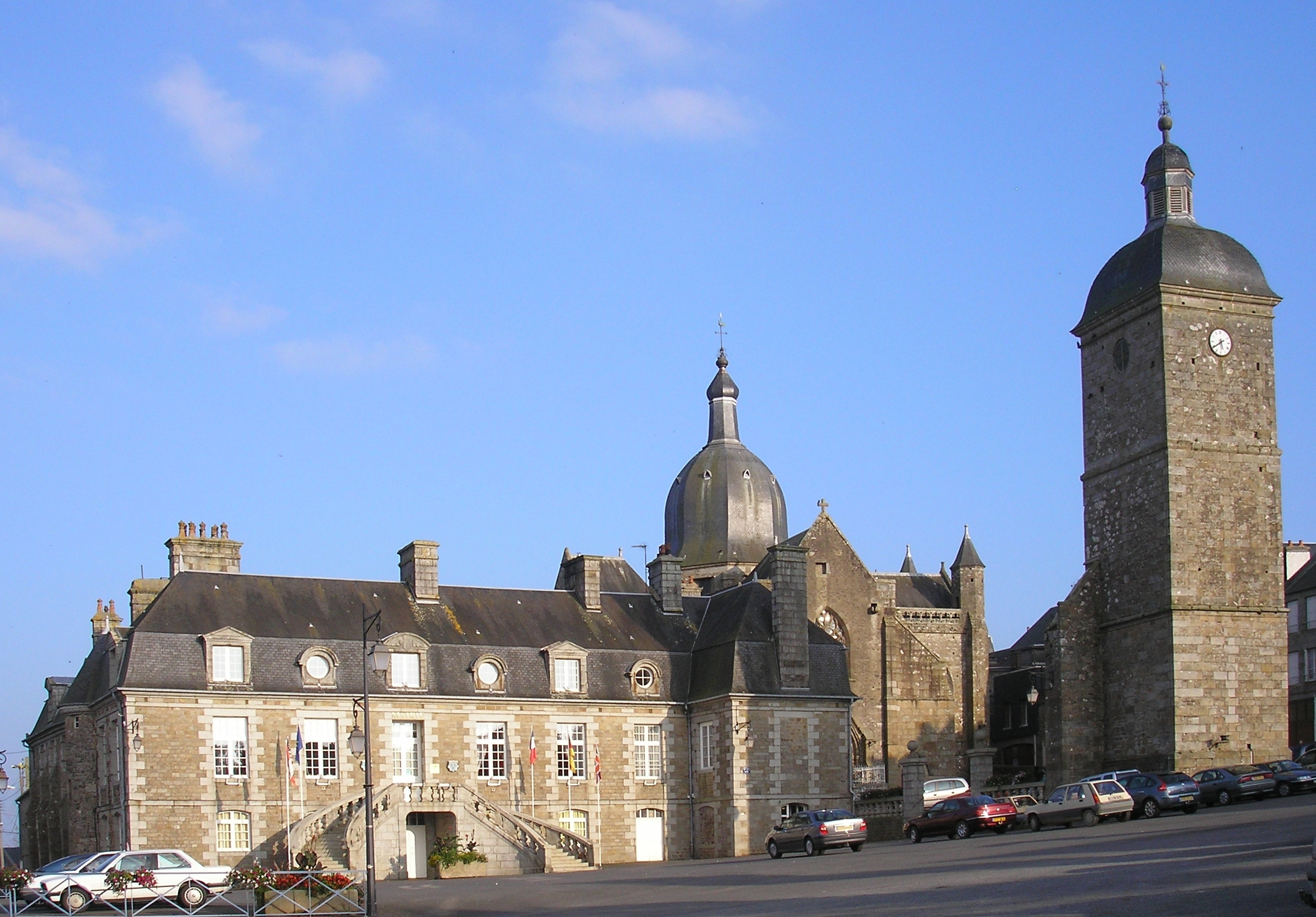 Saint-Sever-Calvados (Normandie, France). La mairie et le clocher, avec en arrière-plan l'ancienne église abbatiale, aujourd'hui église paroissiale.